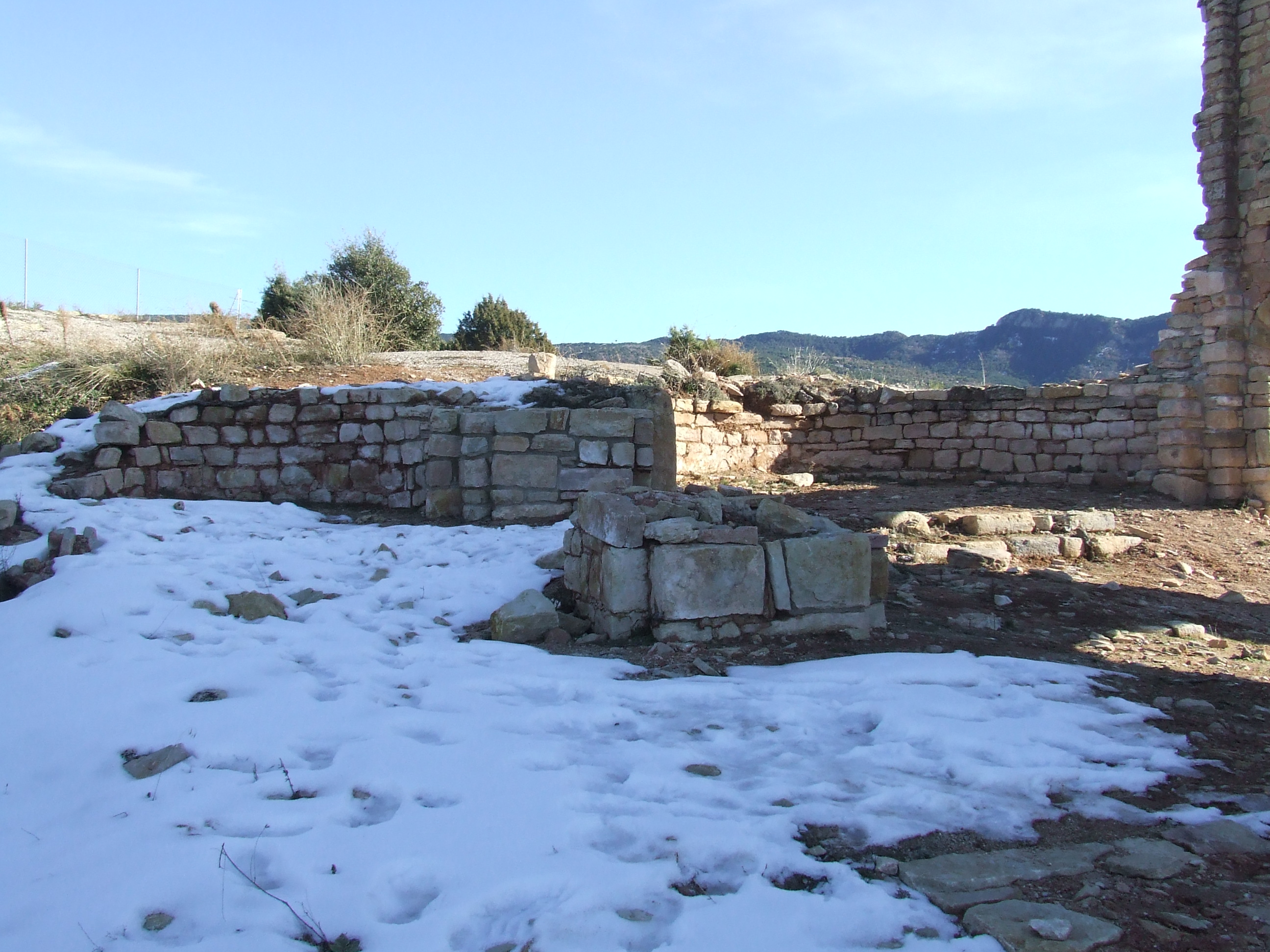 La nau central i l'absis principal de Sant Sadurní del castell de Llordà (Llordà, Isona i Conca Dellà, Pallars Jussà)